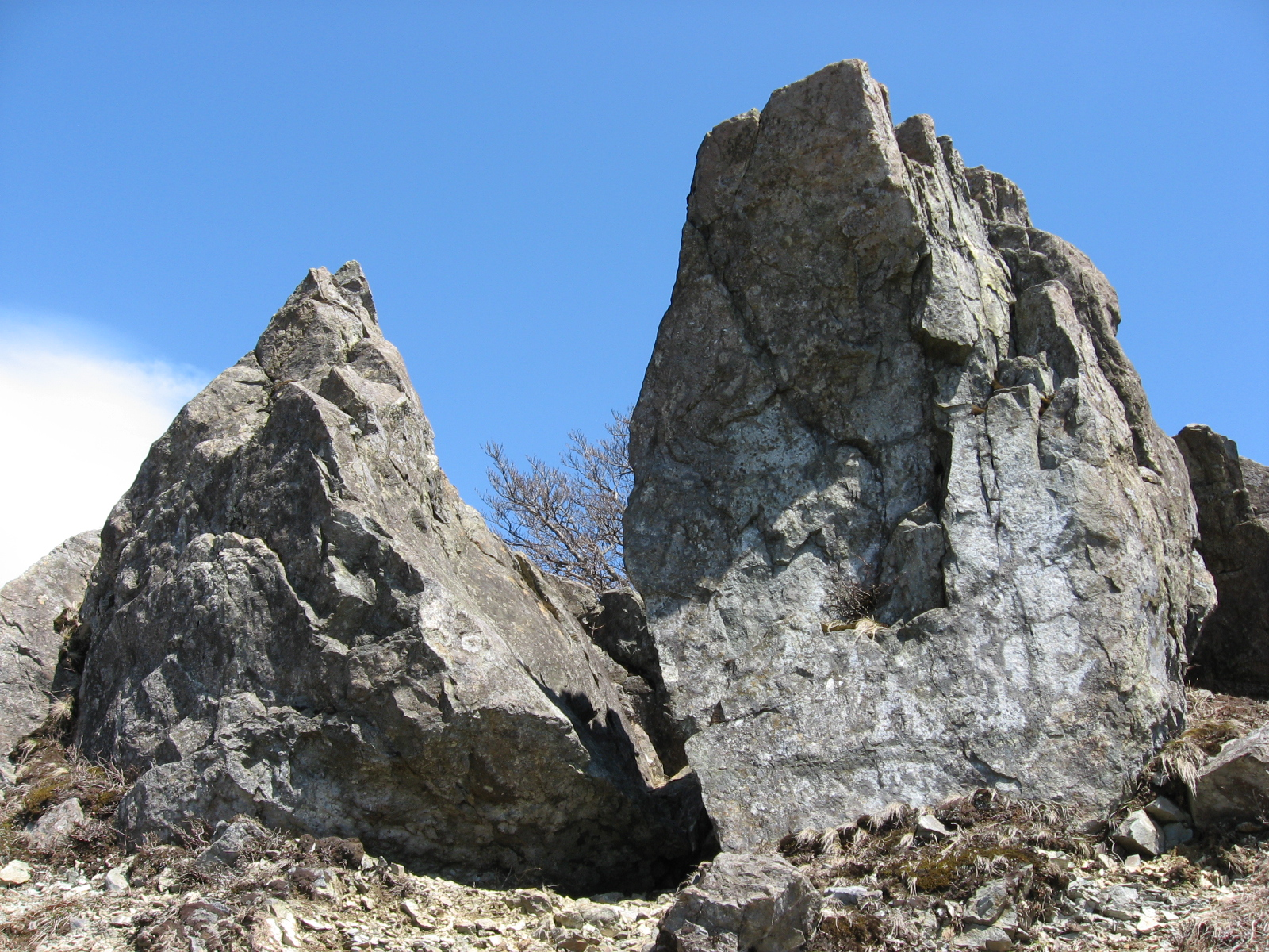 鬼ヶ岩ノ頭付近にそびえる鬼ヶ岩